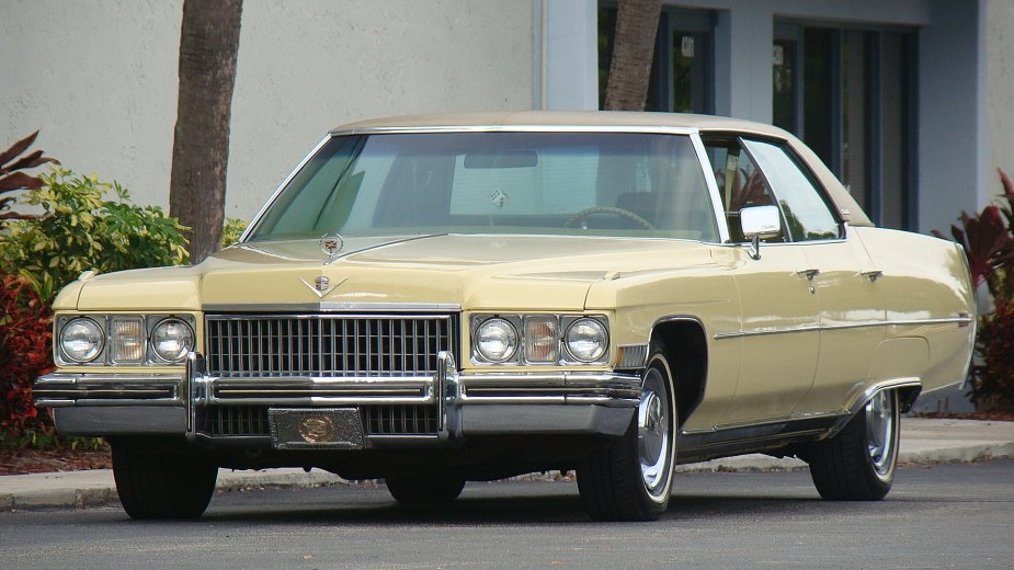 1973 Cadillac Sedan Deville